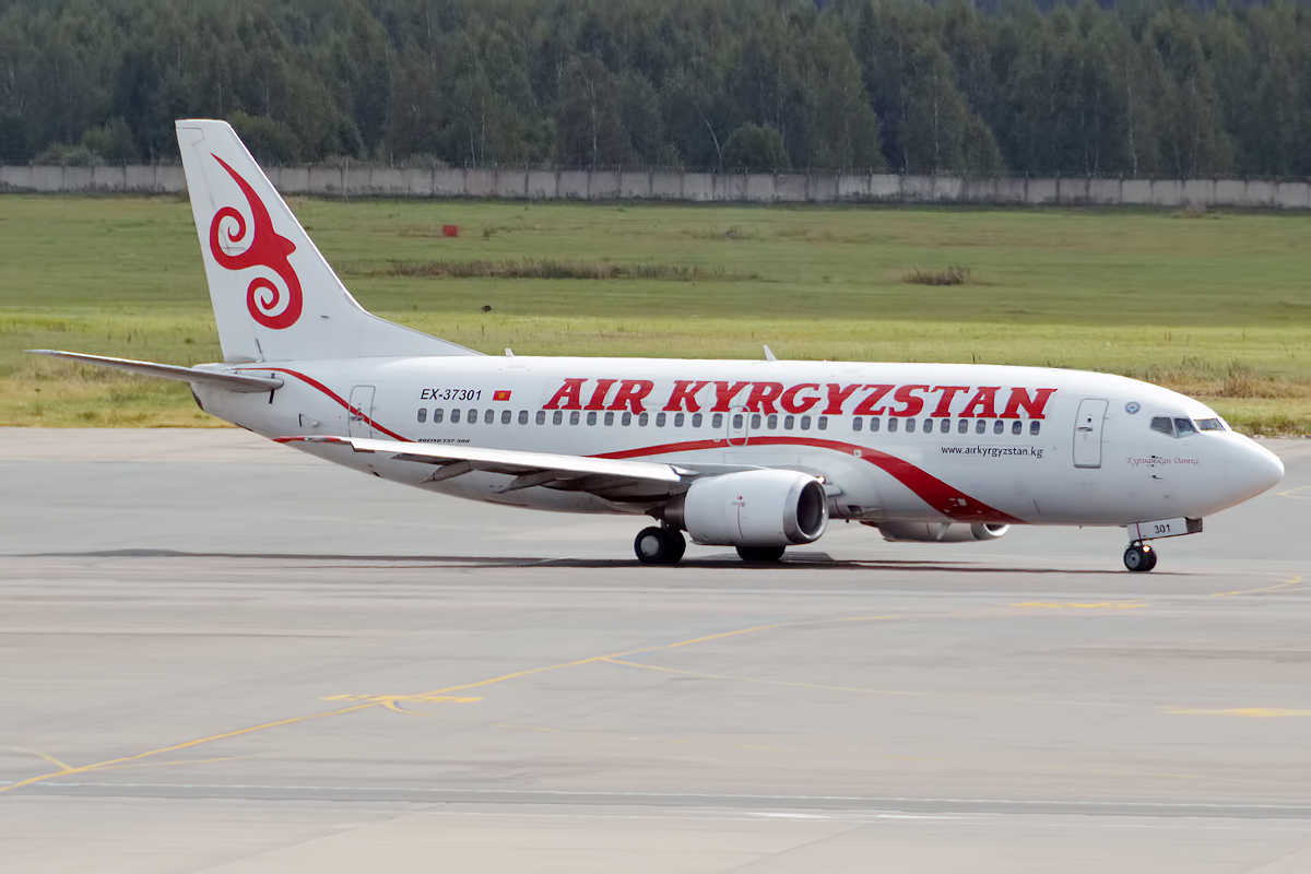 Air Kyrgyzstan, EX-37301, Boeing 737-382